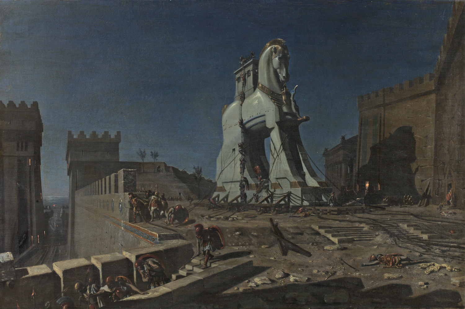 Huile sur toile signée en bas à gauche : HENRI MOTTE 74.